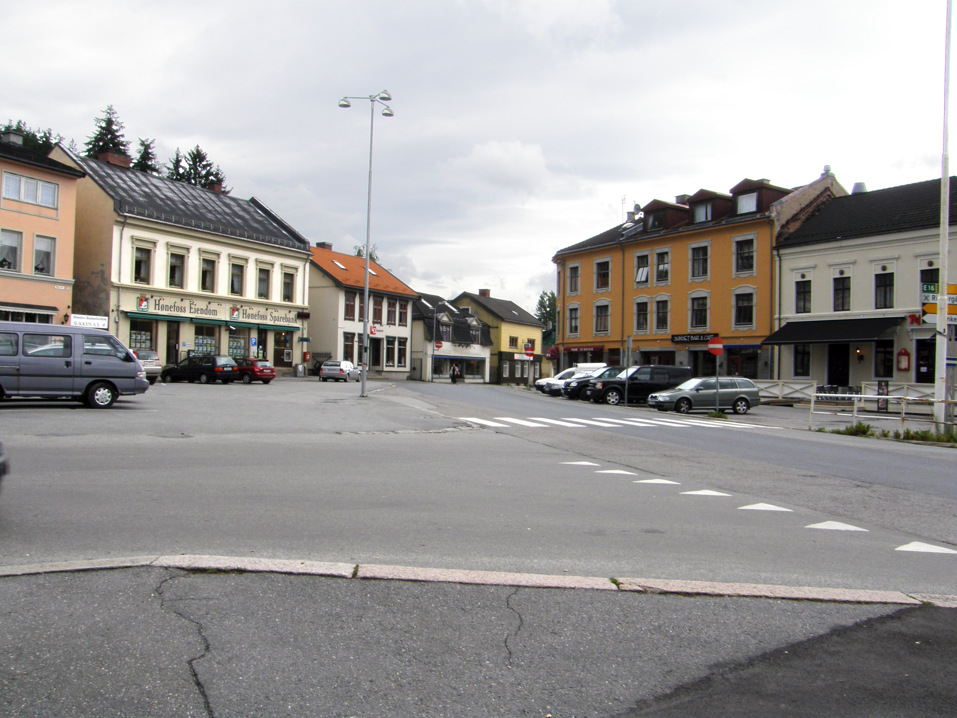 Nordre torv i Hønefoss (Northern Square, Hønefoss, Norway)